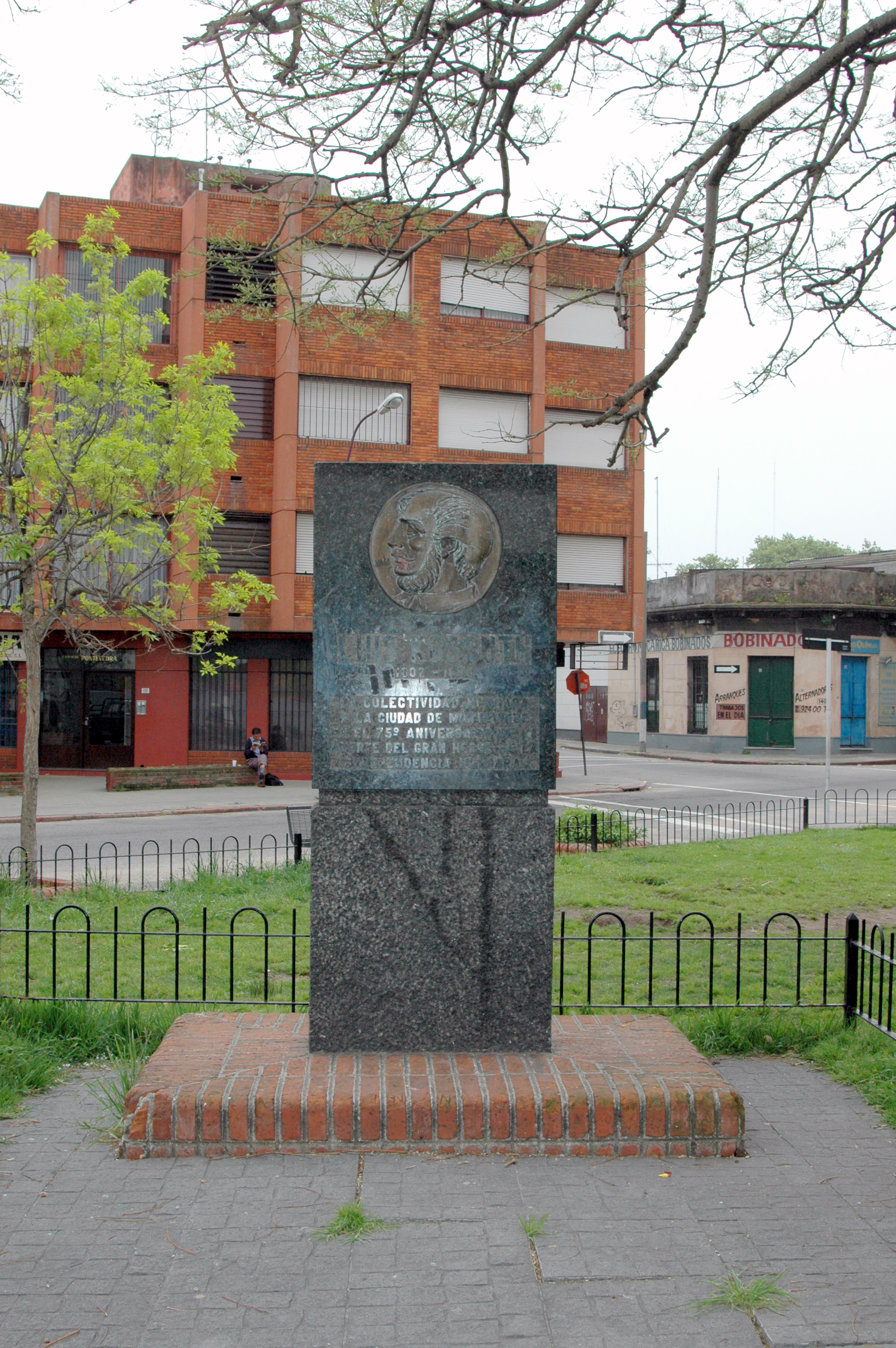 Monumento a Luis Kossuth 1802 - 1894 La colectividad Hungara a la Ciudad de Montevideo Por El 75 Aniversario de la independencia Hungara